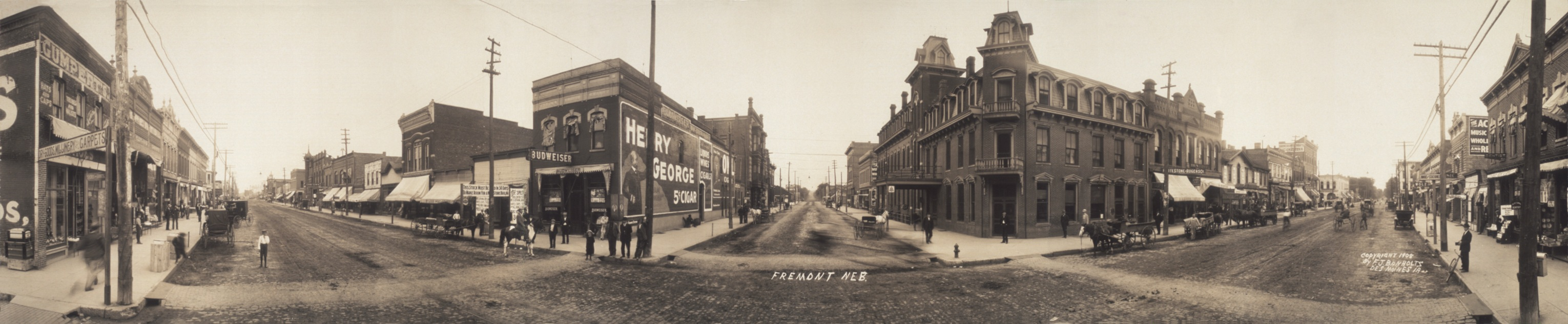 Fremont, Nebraska street